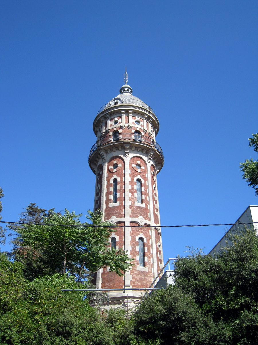 Vallvidrera-Torre d'aigües de Dosrius. L'edifici és una obra de 1902 de Josep Amargós i Samaranch (1849-1918), amb la que va guanyar el primer premi del Concurs Anual d'edificis artístics